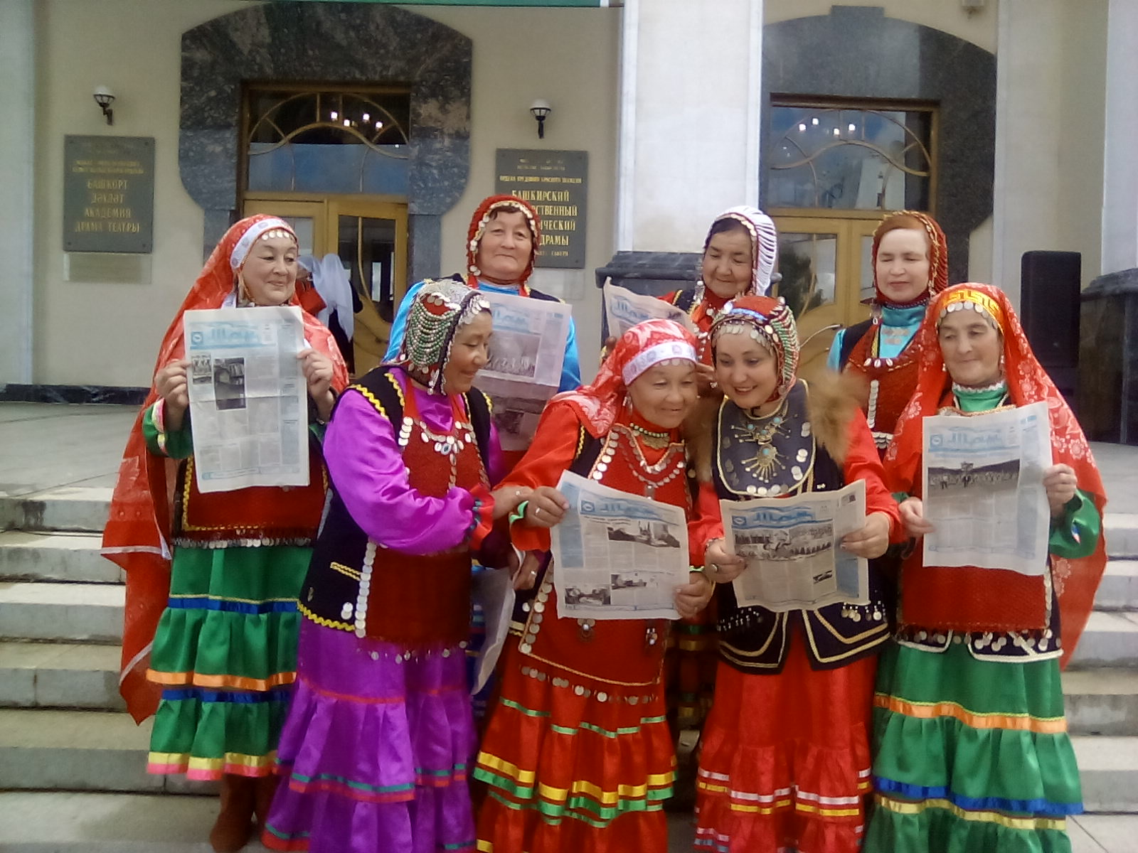 Подписчики районной газеты "Таң"